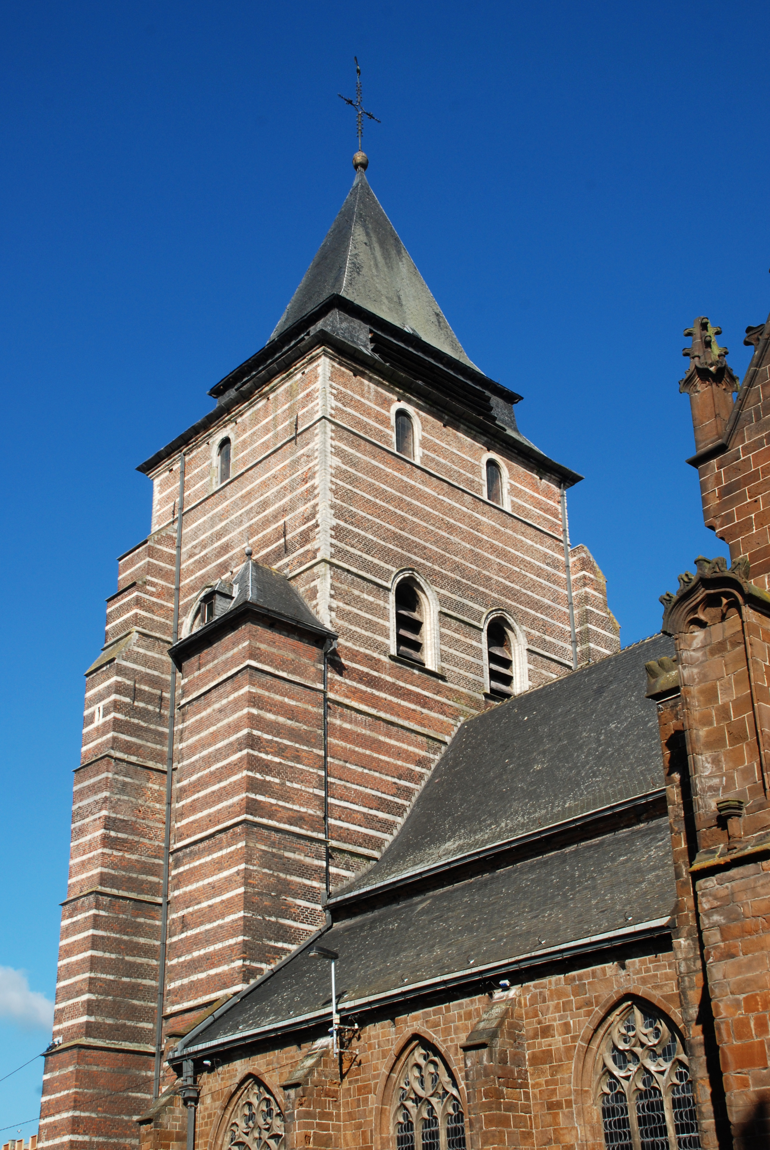 Belgique - Wavre - Église Saint-Jean-Baptiste